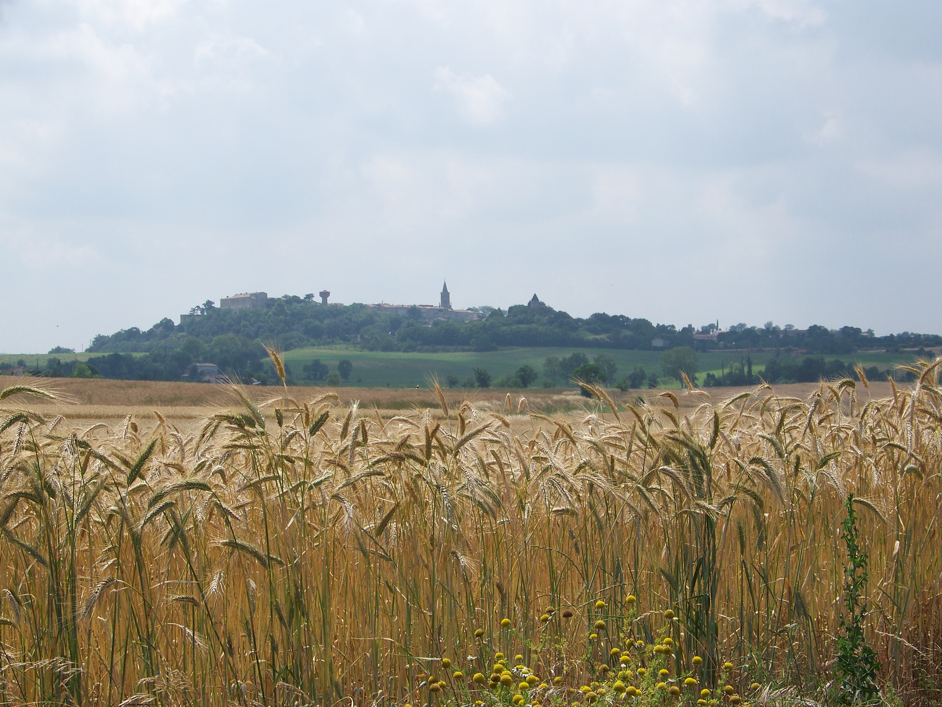 Village de Saint-Félix-Lauragais (Haute-Garonne), vu depuis la route de Roumens.